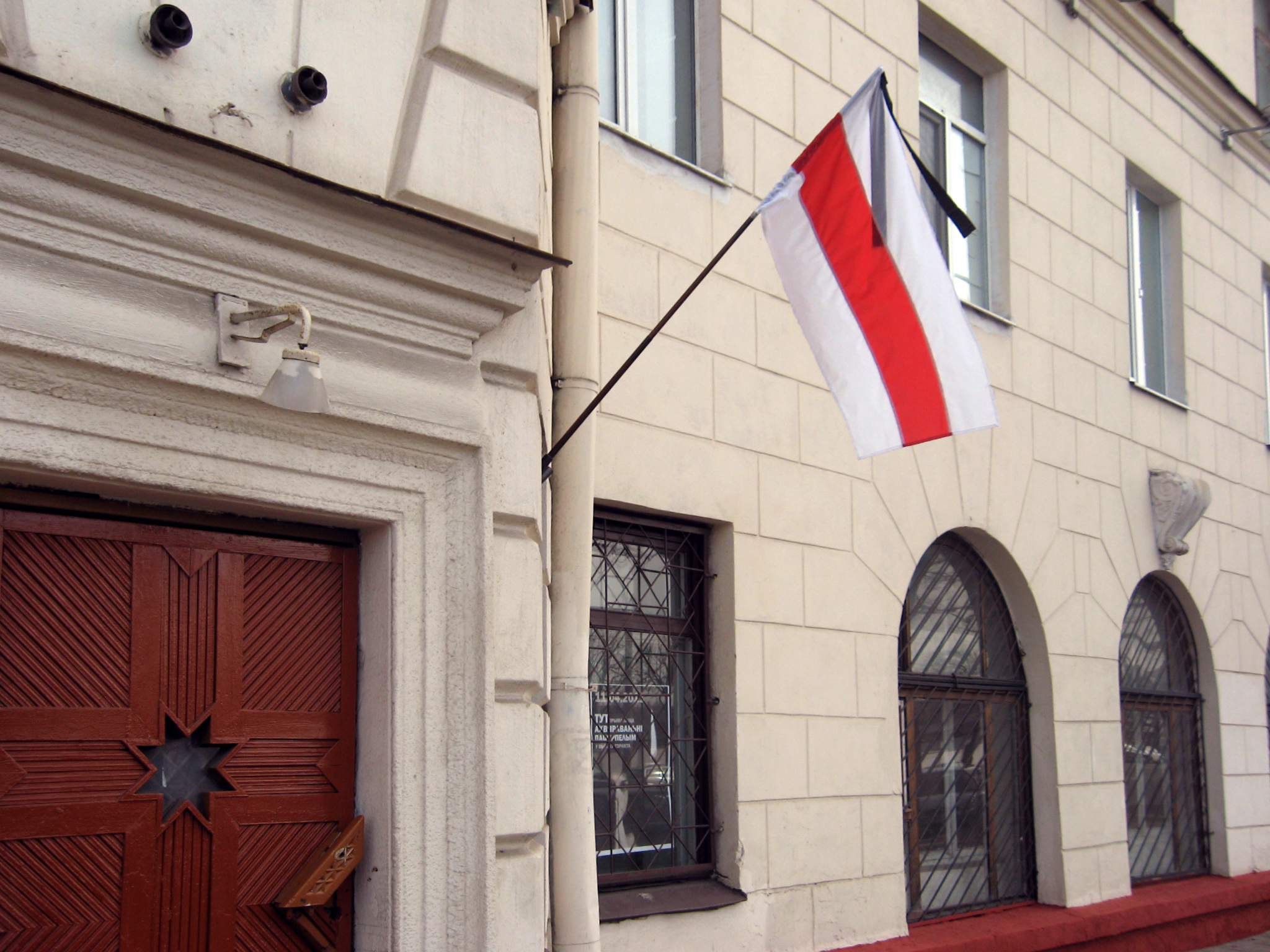 Беларуская (тарашкевіца): бел-чырвона-белы сьцяг з жалобнай стужкай над сядзібай Партыі БНФ